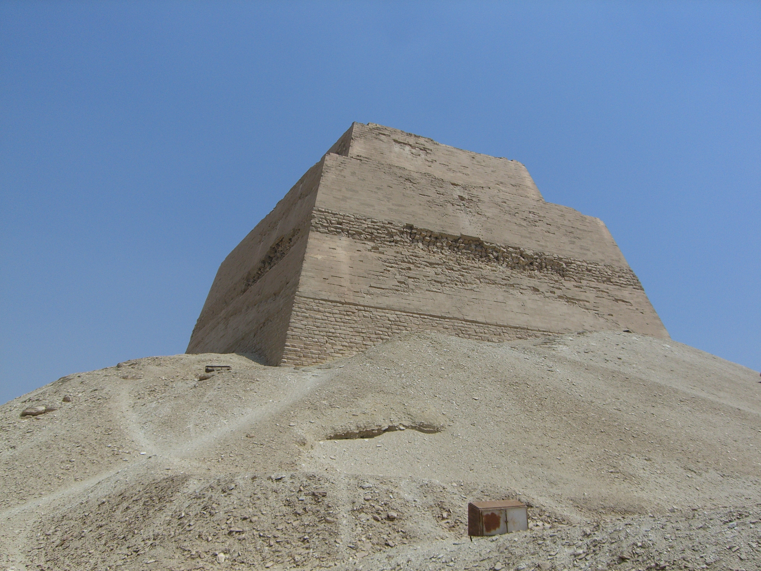 Vue de l'angle sud-ouest de la pyramide de Meïdoum.